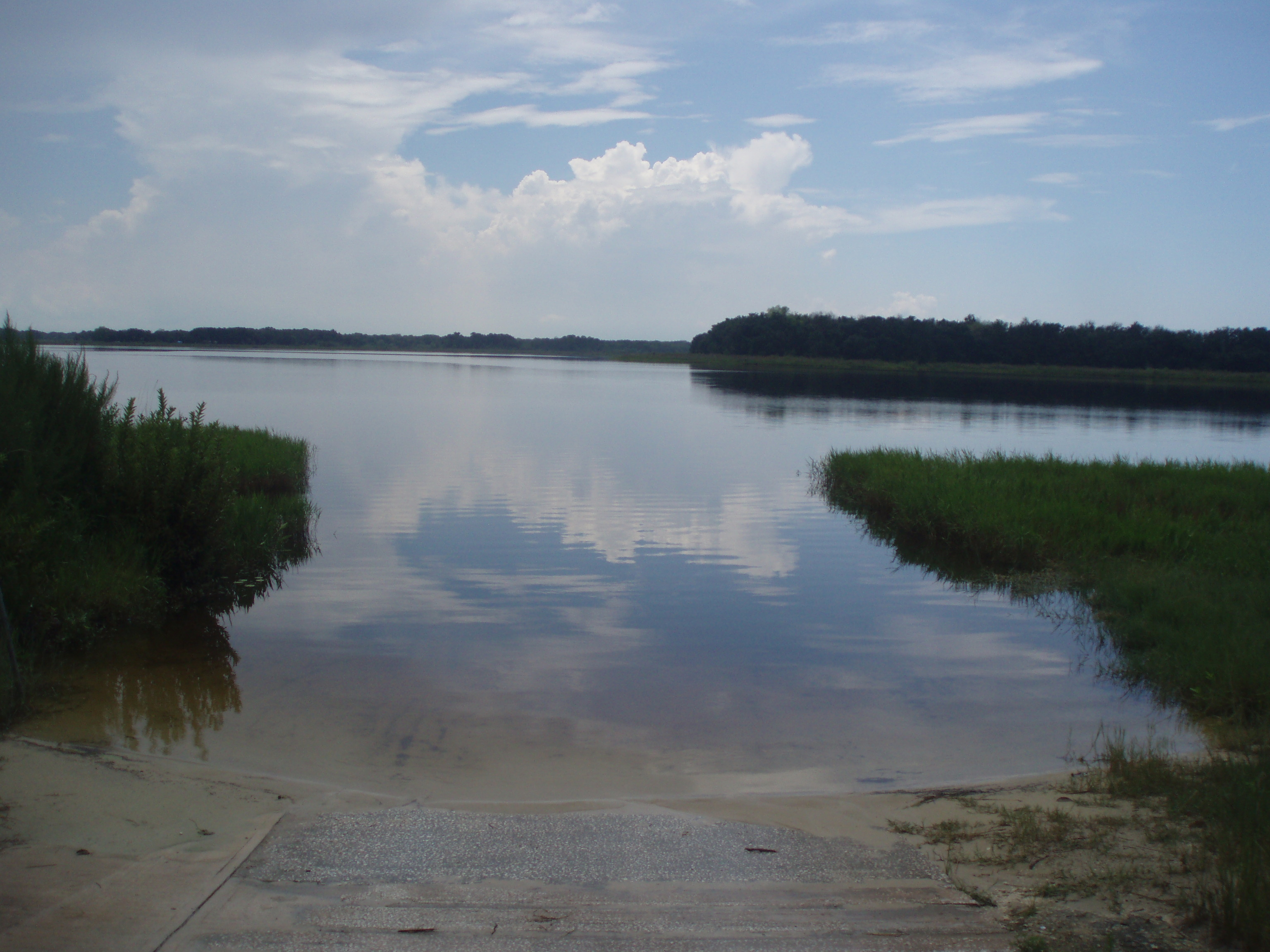 HALFMOON RAMP AND LAKE